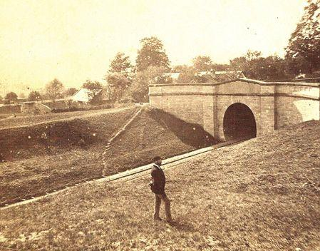 Slavíčský tunel v době provozu (východní portál).